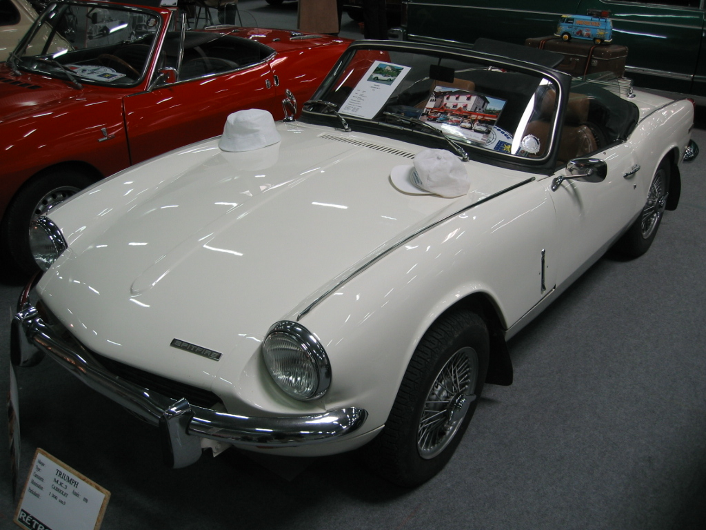 Triump spitfire MK3